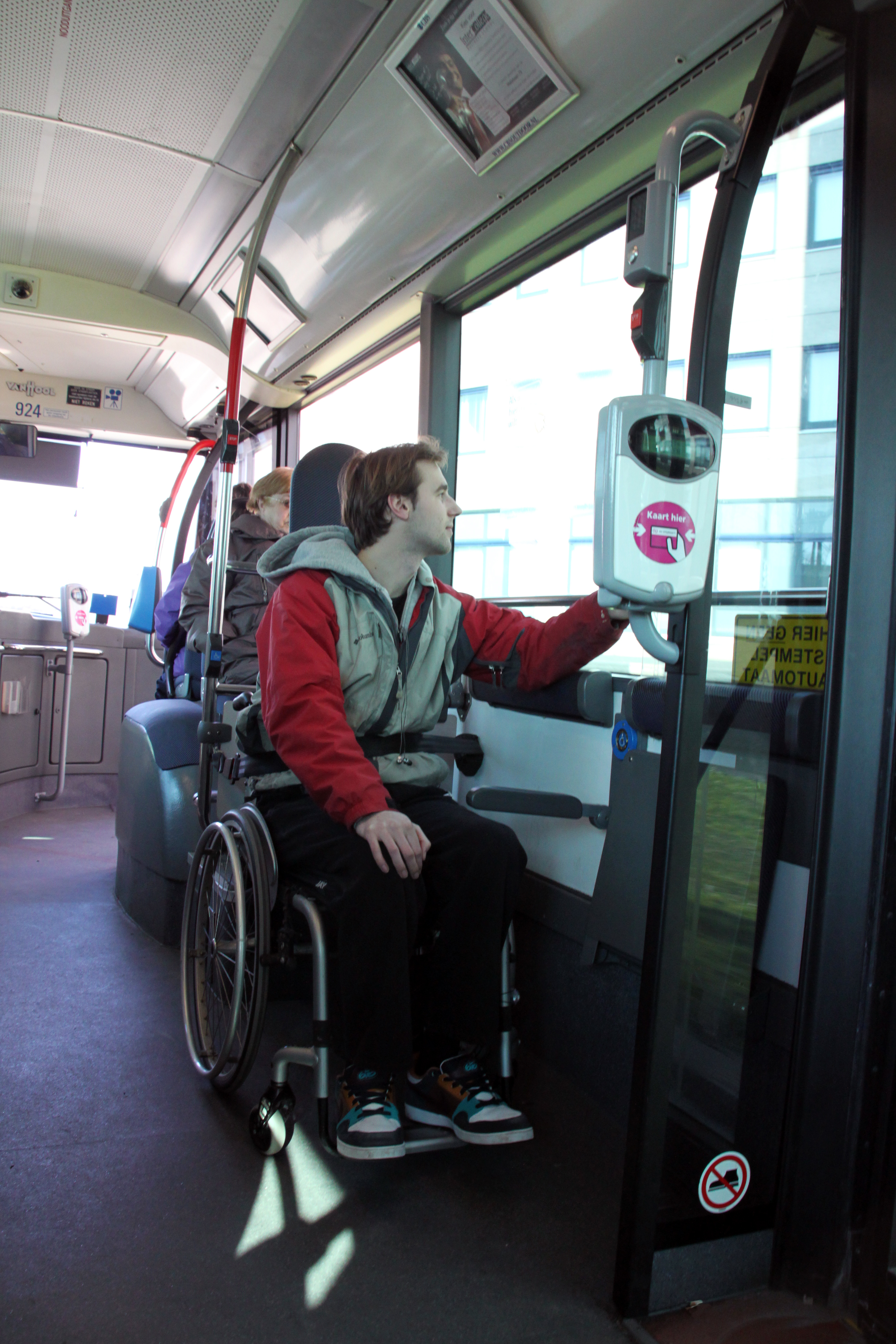 Personen met een rolstoel kunnen gemakkelijker met een lagevloerbus rijden. Binnen een GVU-bus.